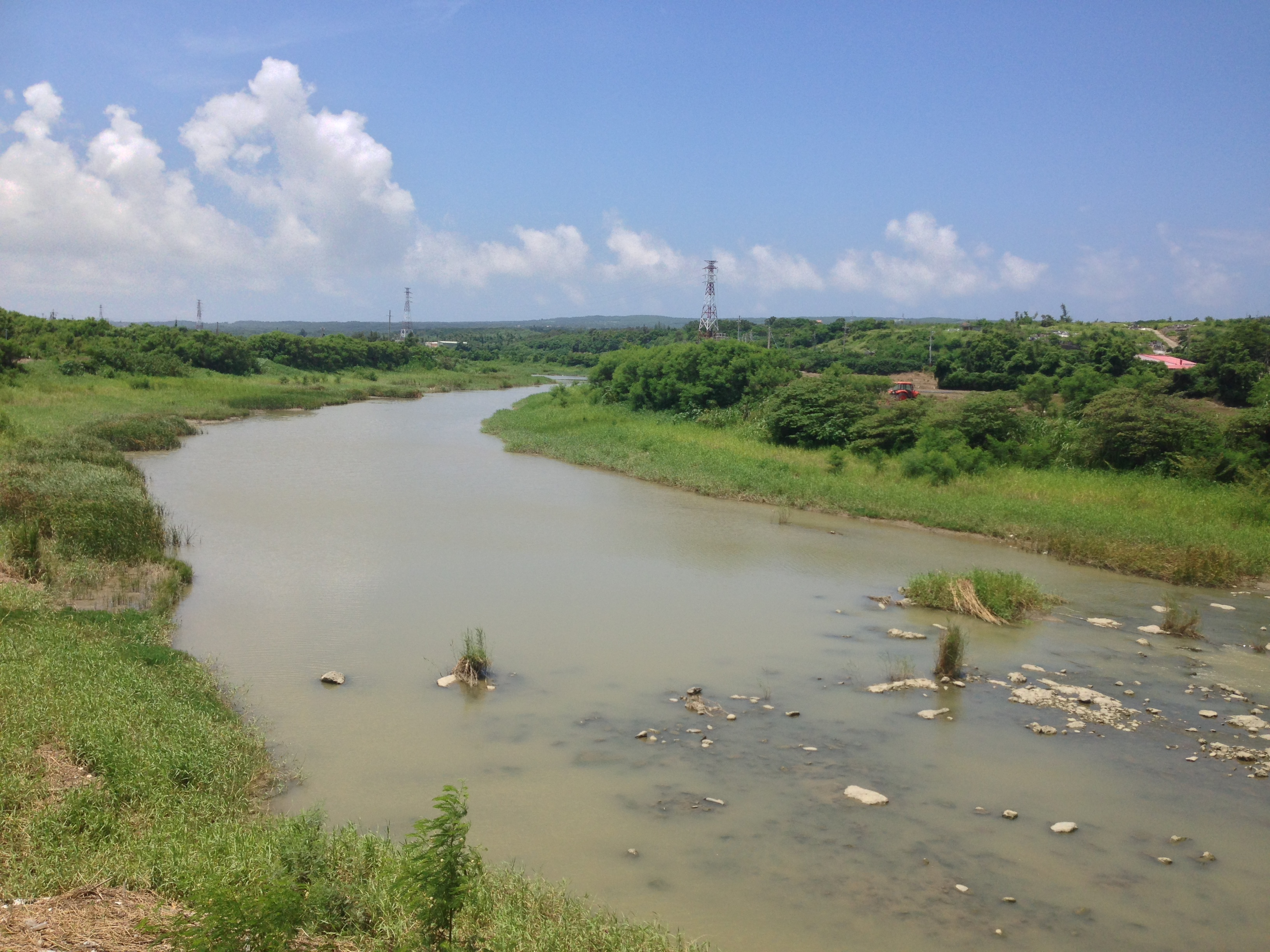 流經恆春鎮的網紗溪。